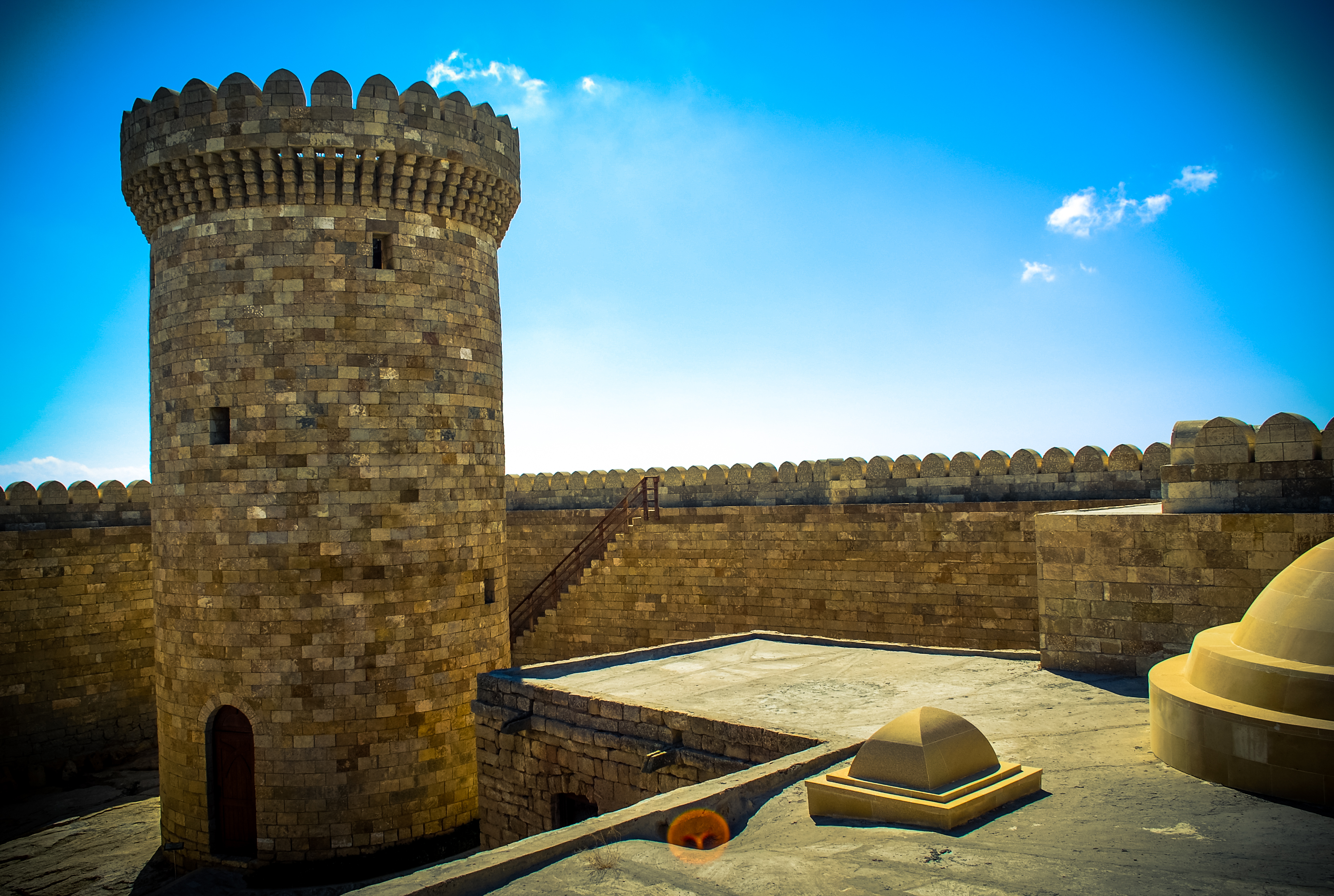 Qala qəsri